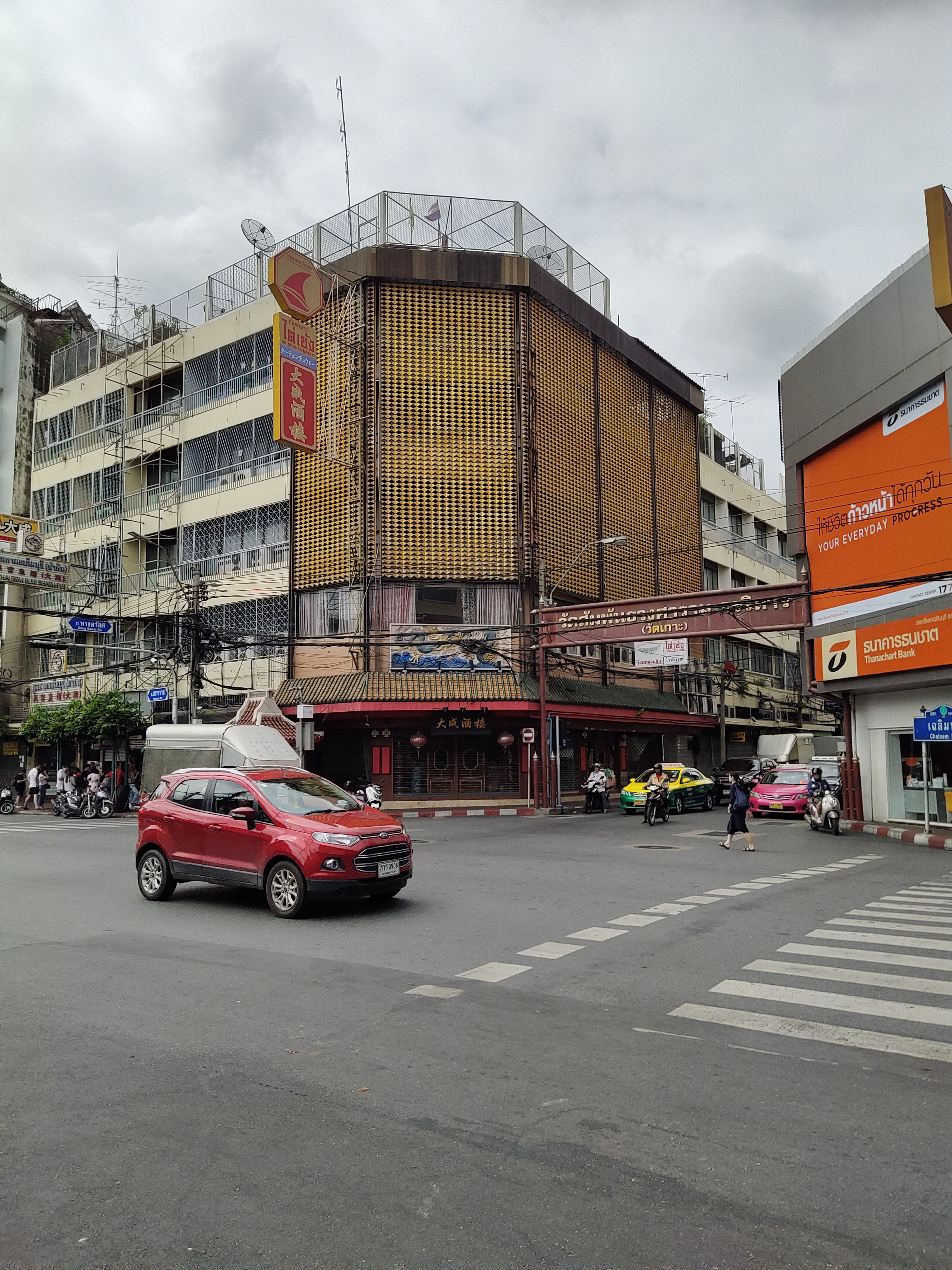 中文（中国大陆）: 曼谷唐人街